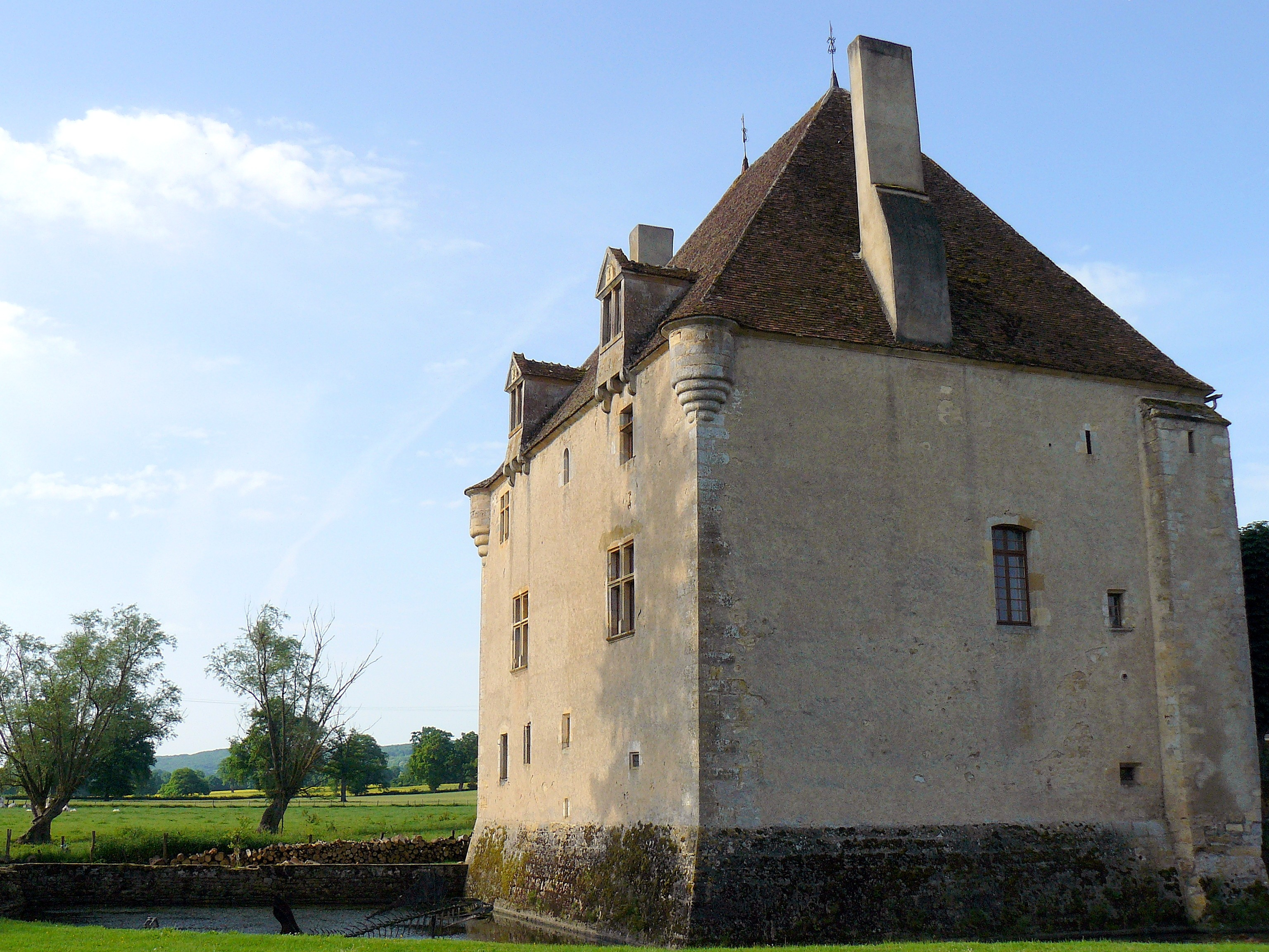 Donjon appelé Logis du Prieur à Lurcy-le-Bourg (Nièvre, France)